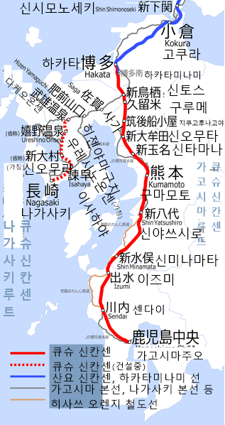 큐슈 신칸센(가고시마 루트 및 나가사키 루트), 하카타미나미 선, 산요 신칸센 일부 구간의 노선도.